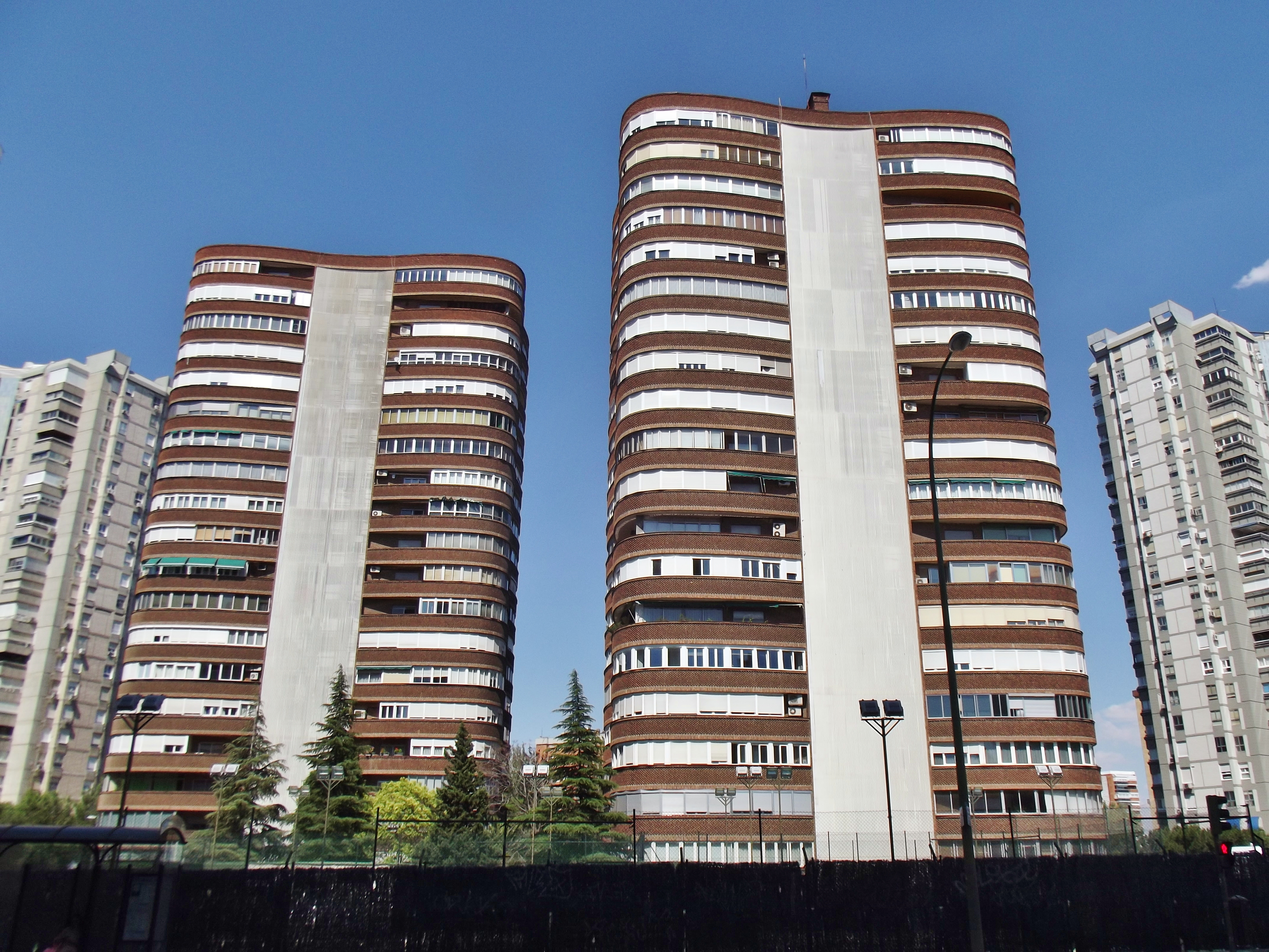 Edificios en Calle Caleruega nº 43-45, Madrid.